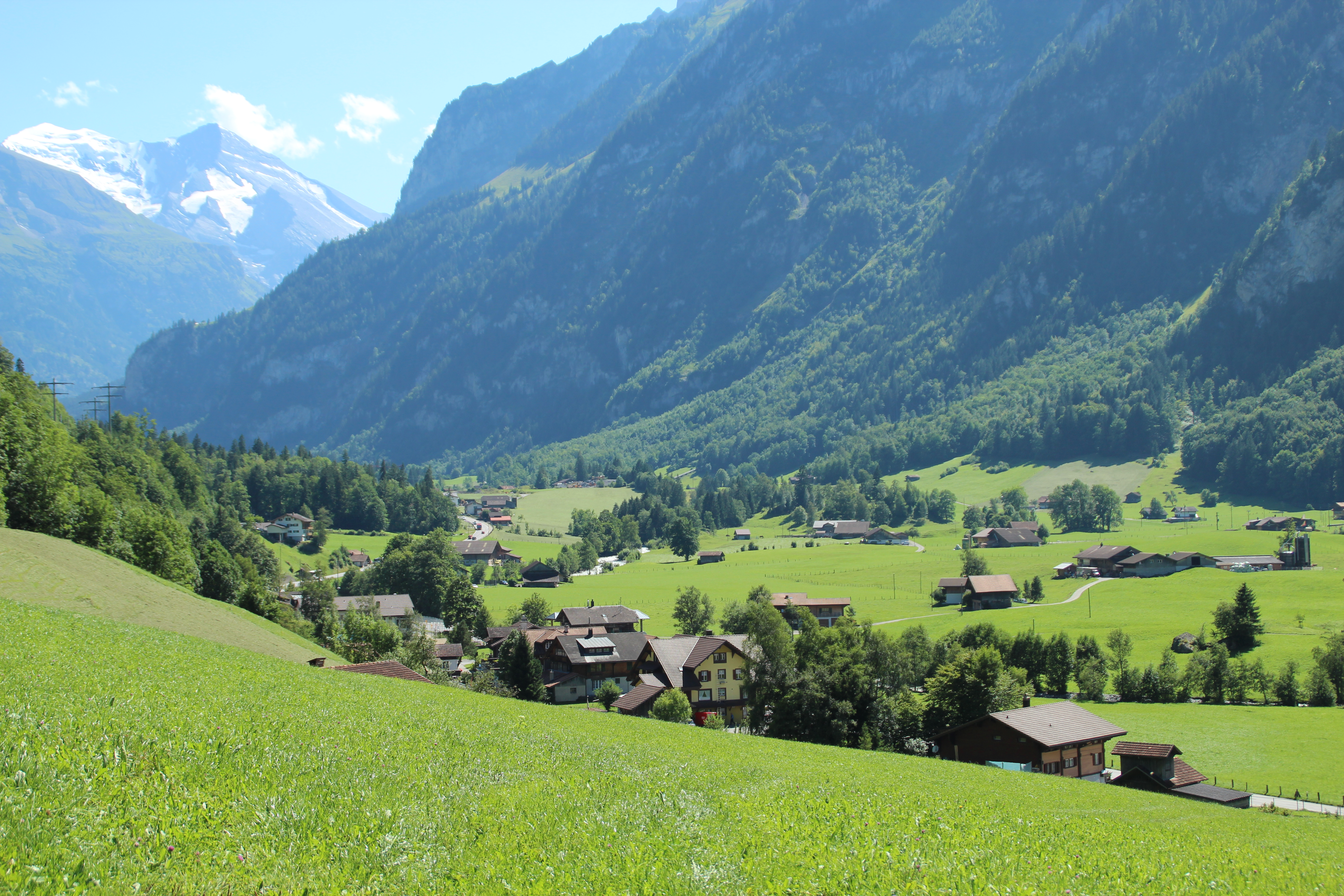 Kandergrund nach Süden